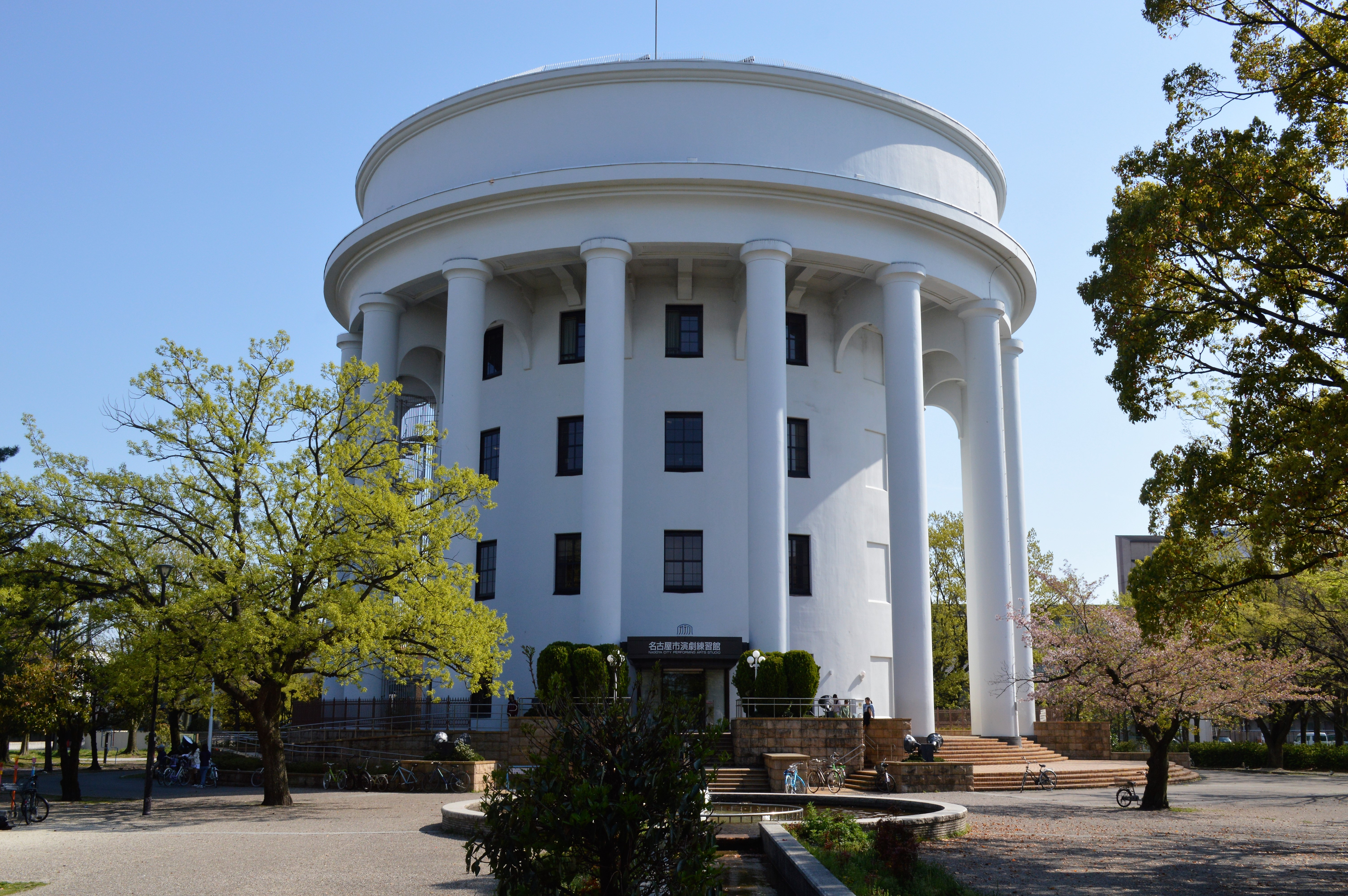 名古屋市演劇練習館。通称「アクテノン」。